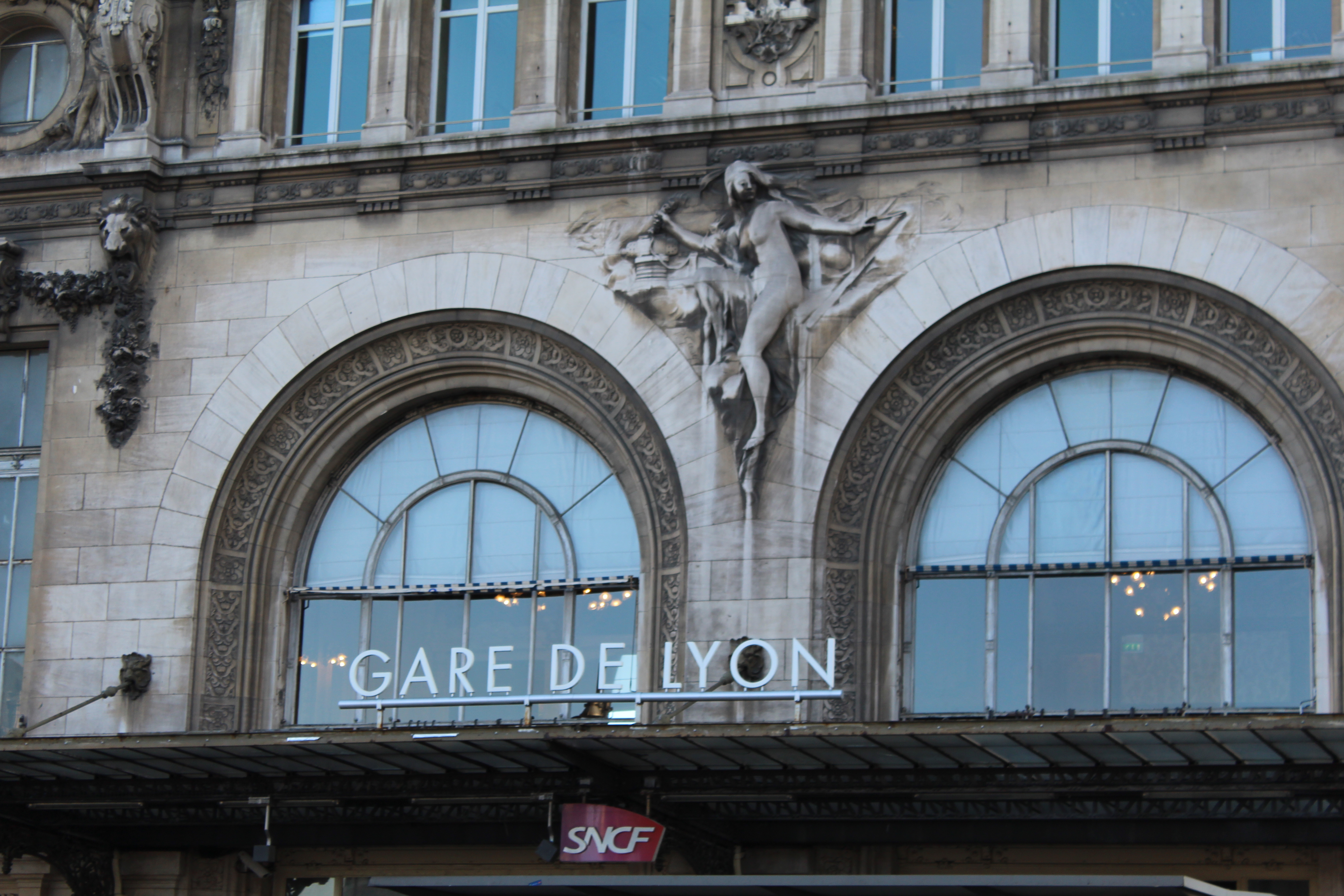 Façade ouest de la gare de Lyon à Paris.